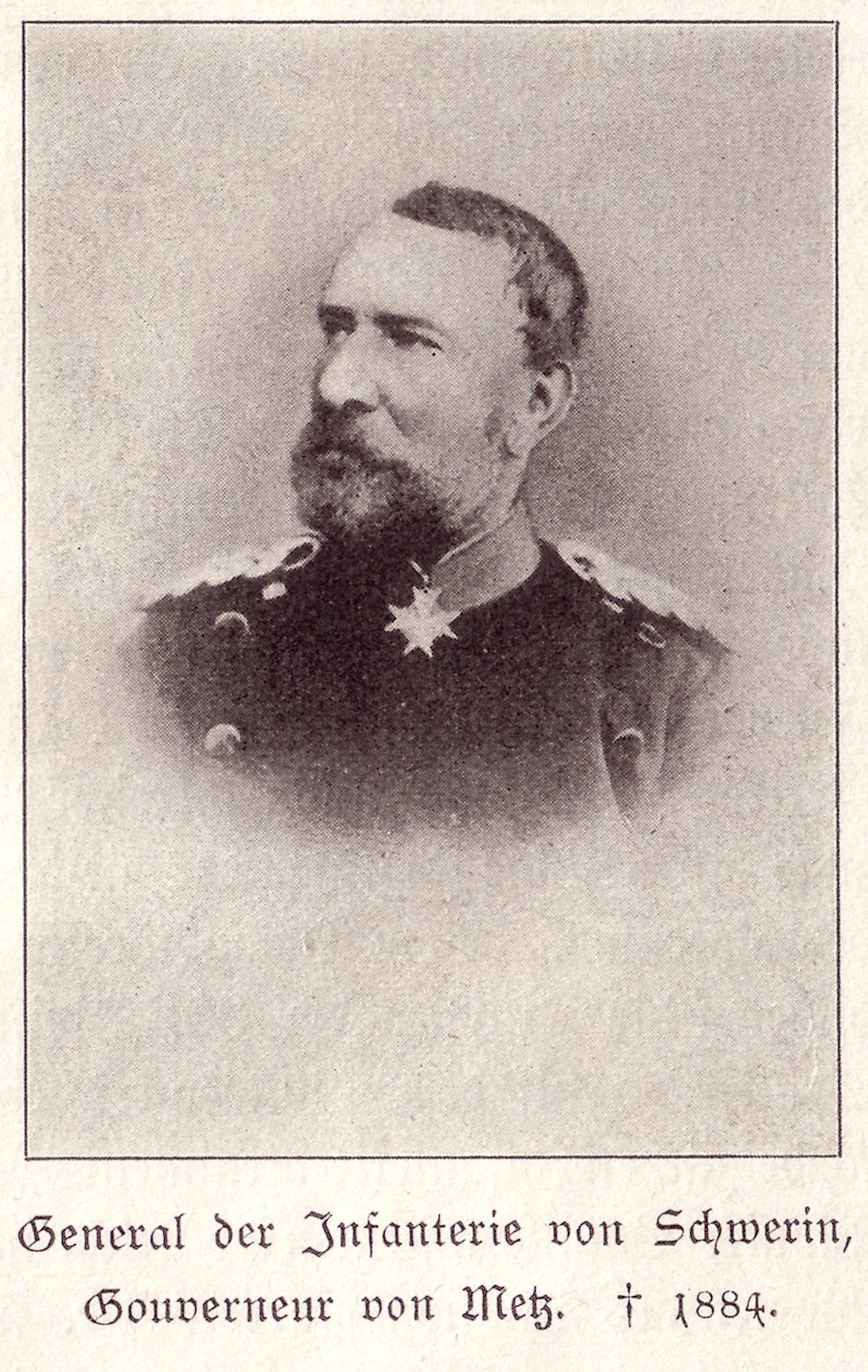 Prussian General Kurt von Schwerin